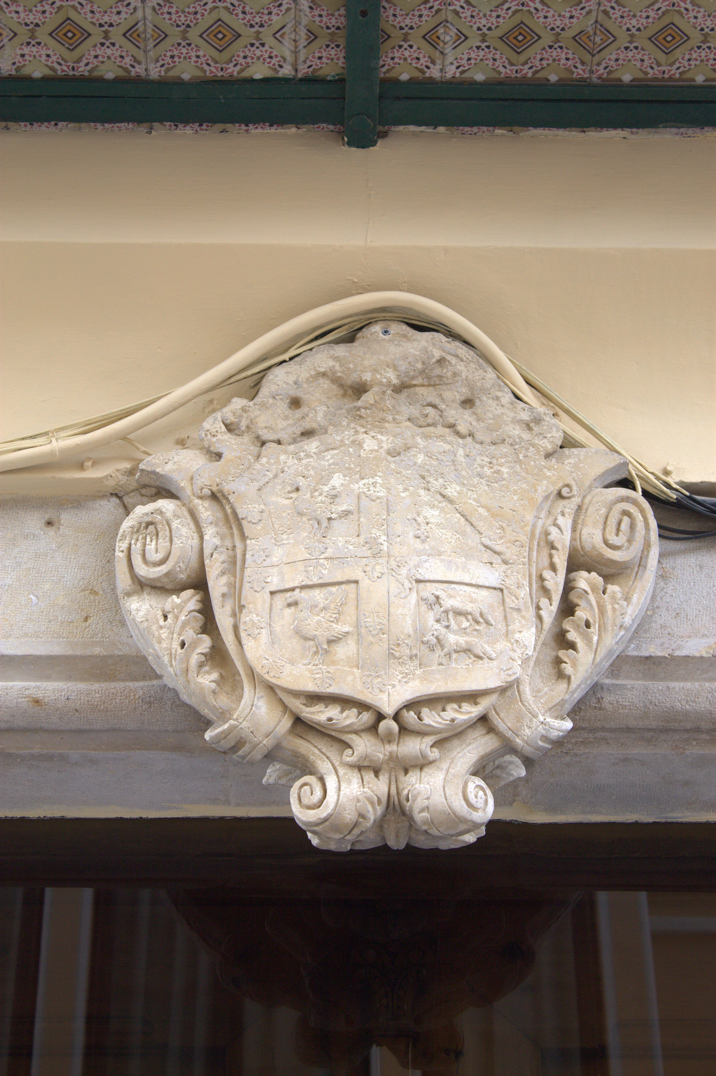 Escut a l'edifici del carrer Sant Roc, 8 (Alzira)